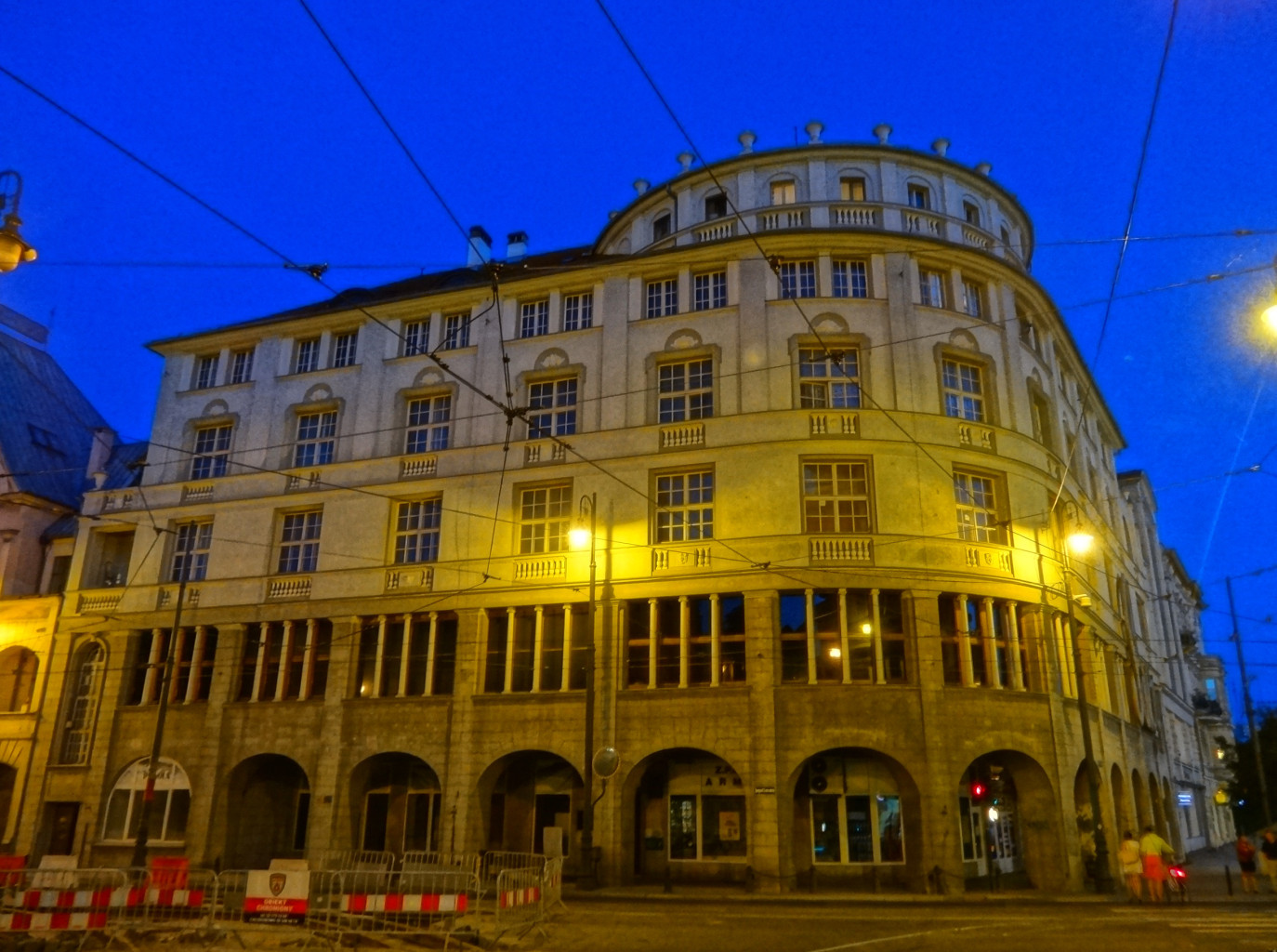 Kamienica pl. Teatralny 6 w Bydgoszczy na rogu ul. Jagiellońskiej (1913, aut. Heinrich Gross z Berlina)